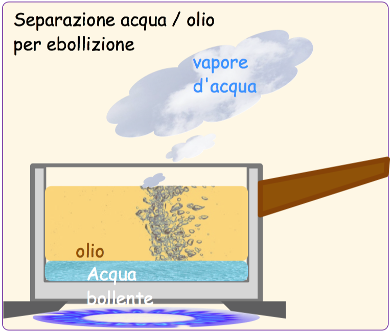 Separazione olio / acqua: medicina popolare, rimedi, galenica, olio, separazione, ebollizione